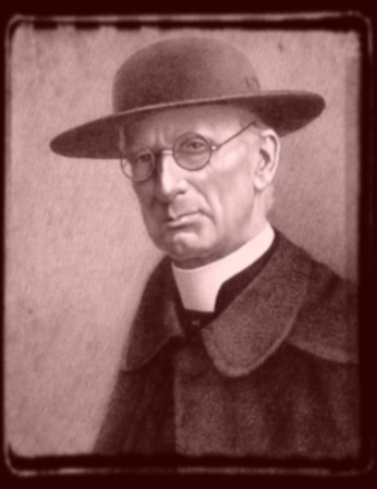 edmond puissant